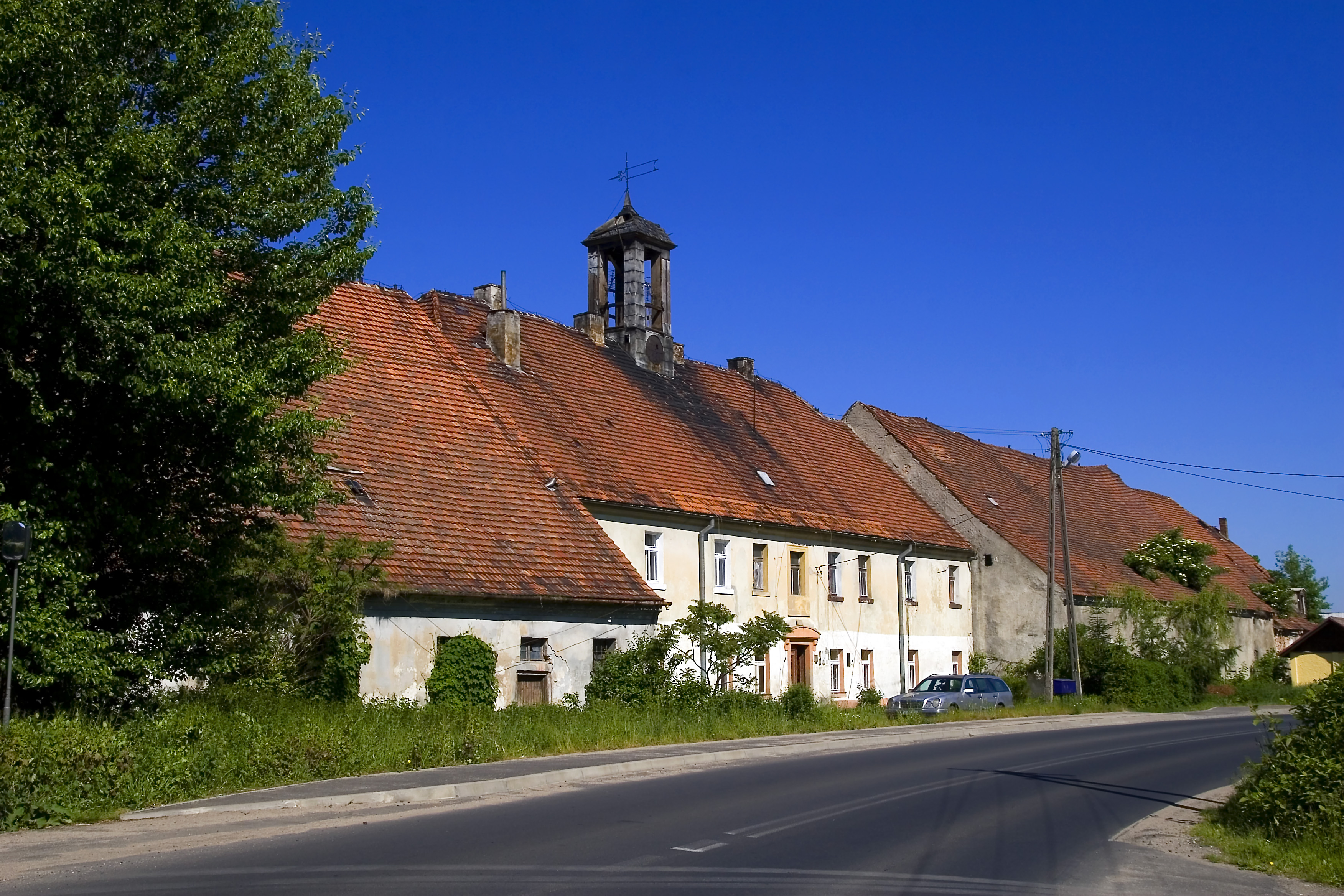 Tomaszów Bolesławiecki - oficyna pałacowa (zabytek nr 527/L z 22.11.1977)